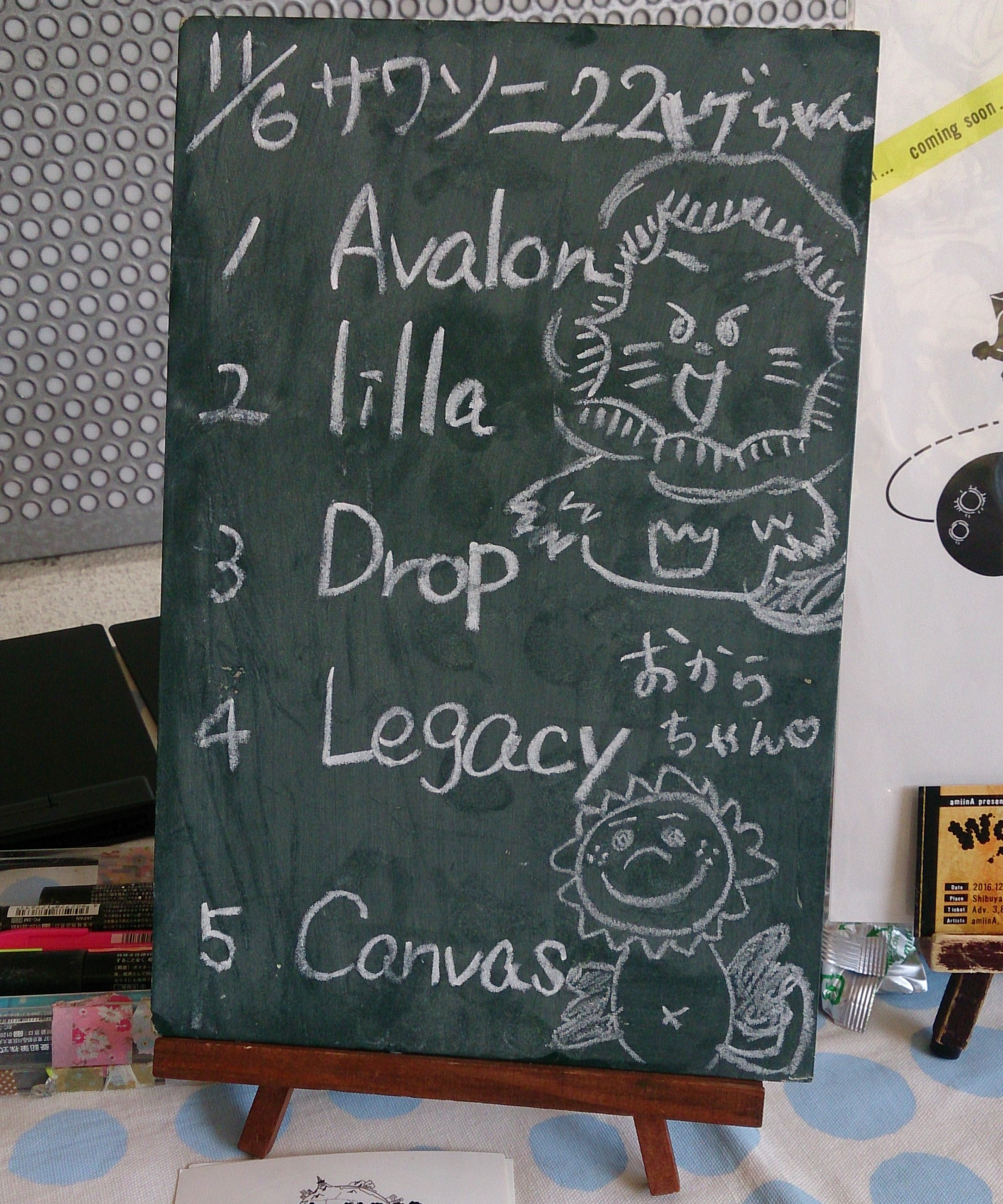 amiinAセトリボード(20161106(1))